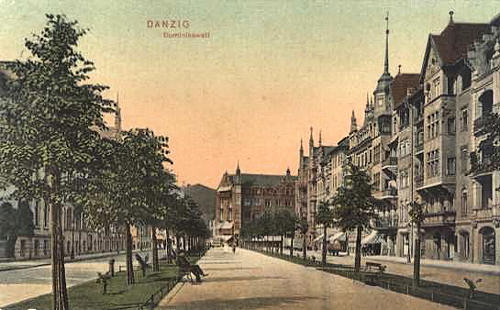 Ulica Wały Jagiellońskie w Gdańsku - część południowa (dawna ulica Dominikswall).